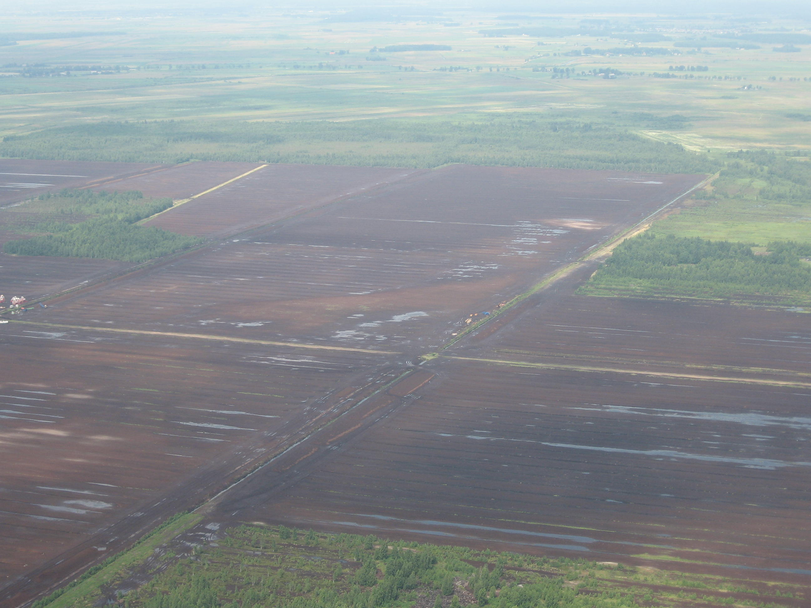 Traksėdžių durpynai